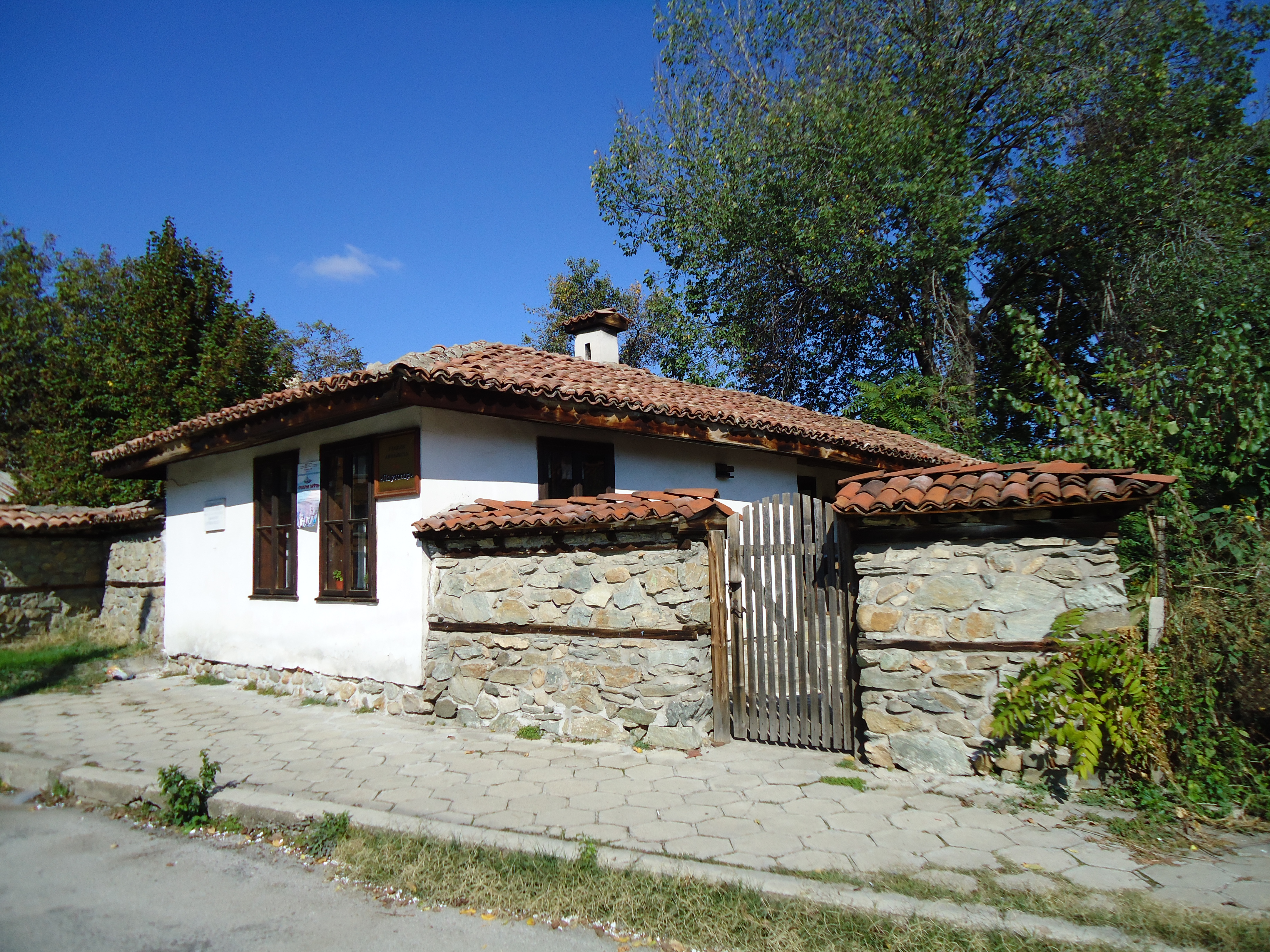 Къщата на композитора Георги Горанов в гр.Кюстендил